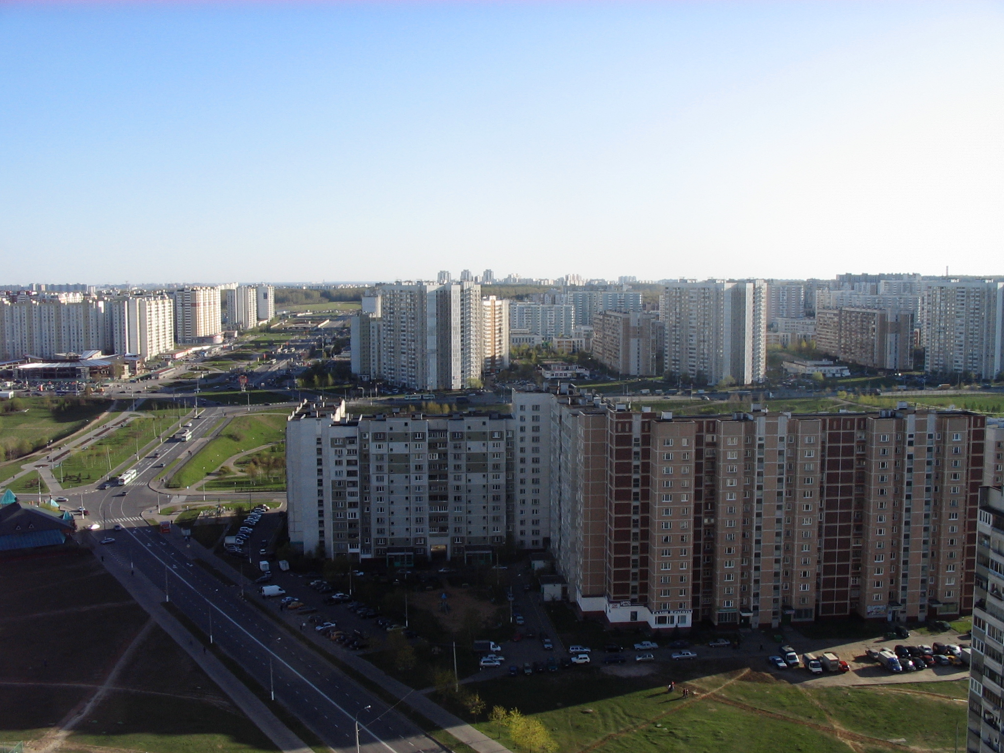 Вид Северного БутоваВид с крыши одного из домов района Северное Бутово города Москвы